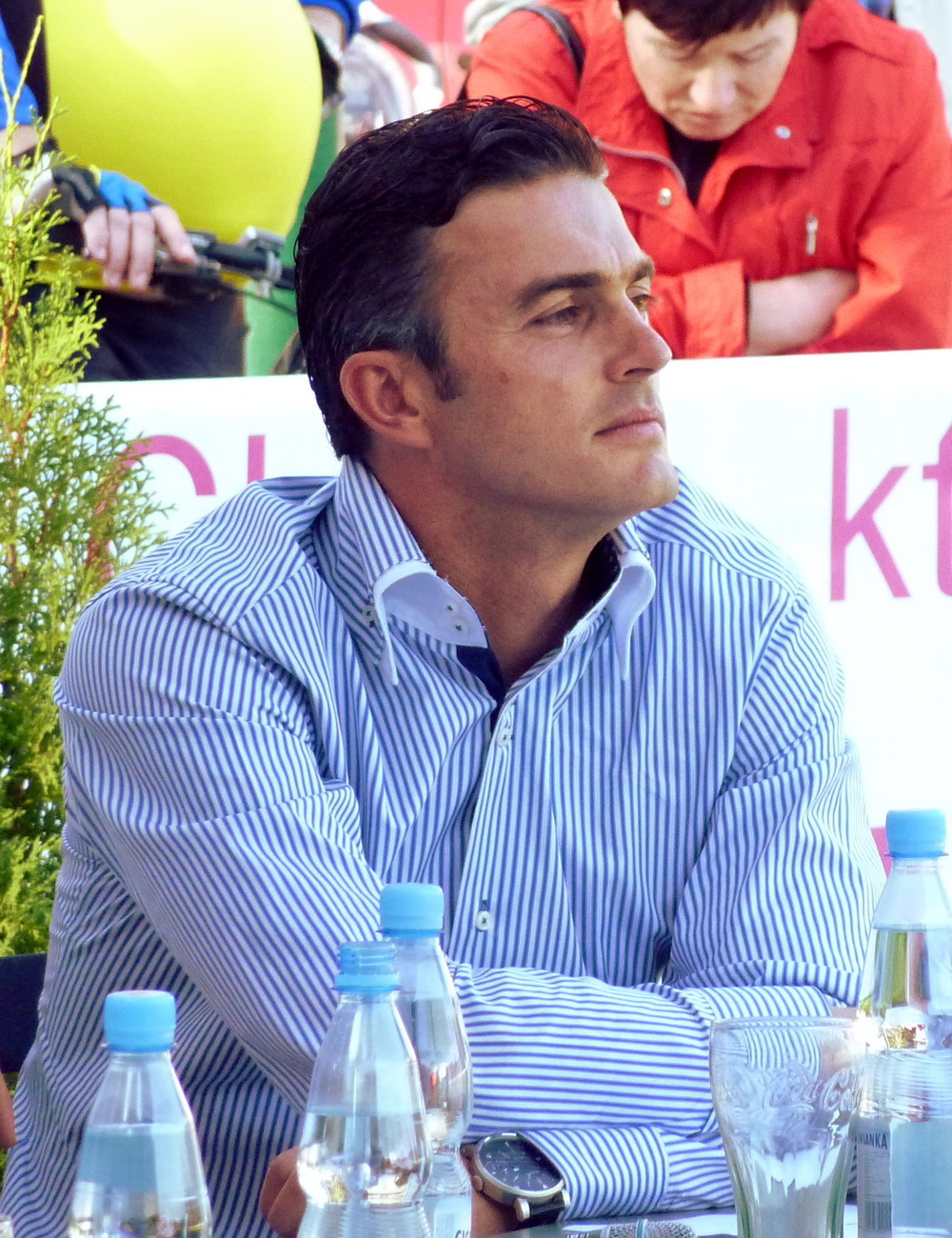 Marcin Żewłakow podczas imprezy sportowej na stadionie klubu "Drukarz" Warszawa w Parku Skaryszewskim.